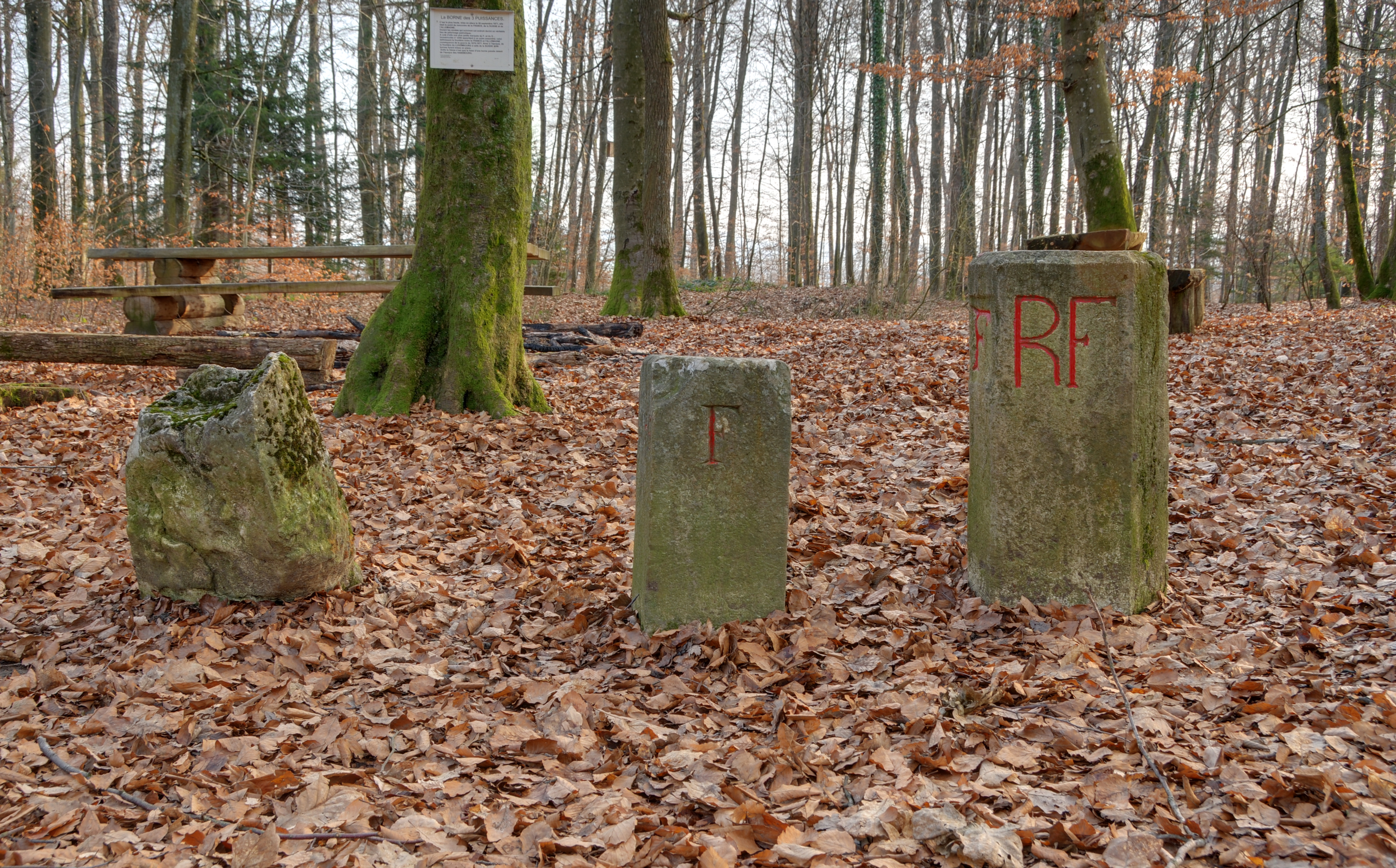 This photograph was taken with a Nikon D300 Site de la borne des Trois Puissances. A droite, la borne des trois puissances. Au milieu, une des bornes marquant la frontière entre la France et l'Allemagne (l'Alsace-Lorraine était annexée, conséquence de la guerre de 1870-1871). A gauche, ce n'est que la base d'une borne datant de l'époque des Habsbourg (HDR).